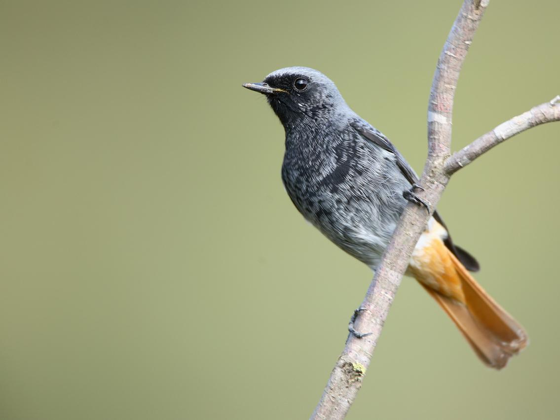 Colirrojo tizón macho